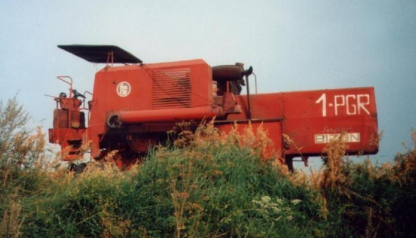 Maszyna PGR, kombajn Bizon model Z056 Author Andrzej DYmko